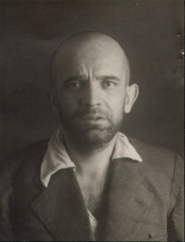 Станислав Францевич Гржегожевский Гжельщак, сын Франца Гжельщака, инженер-конструктор на заводе № 8 в г. Москве, бывший член ЦК КП Польши.